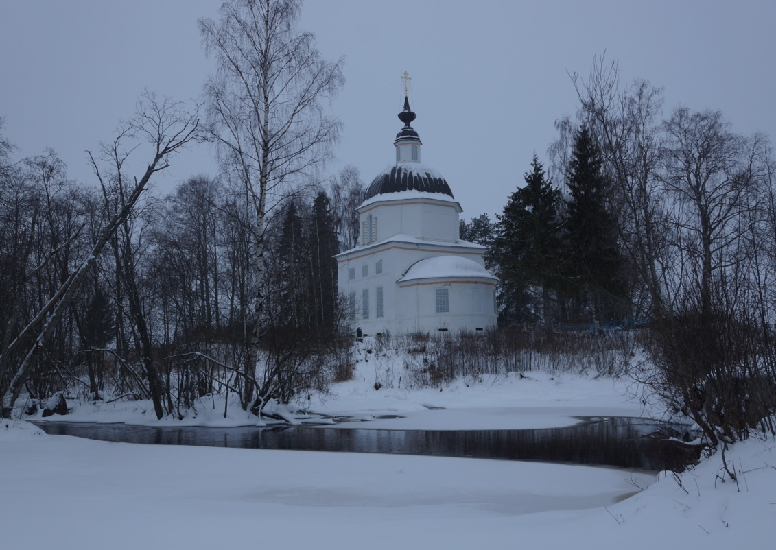 Вид на храм